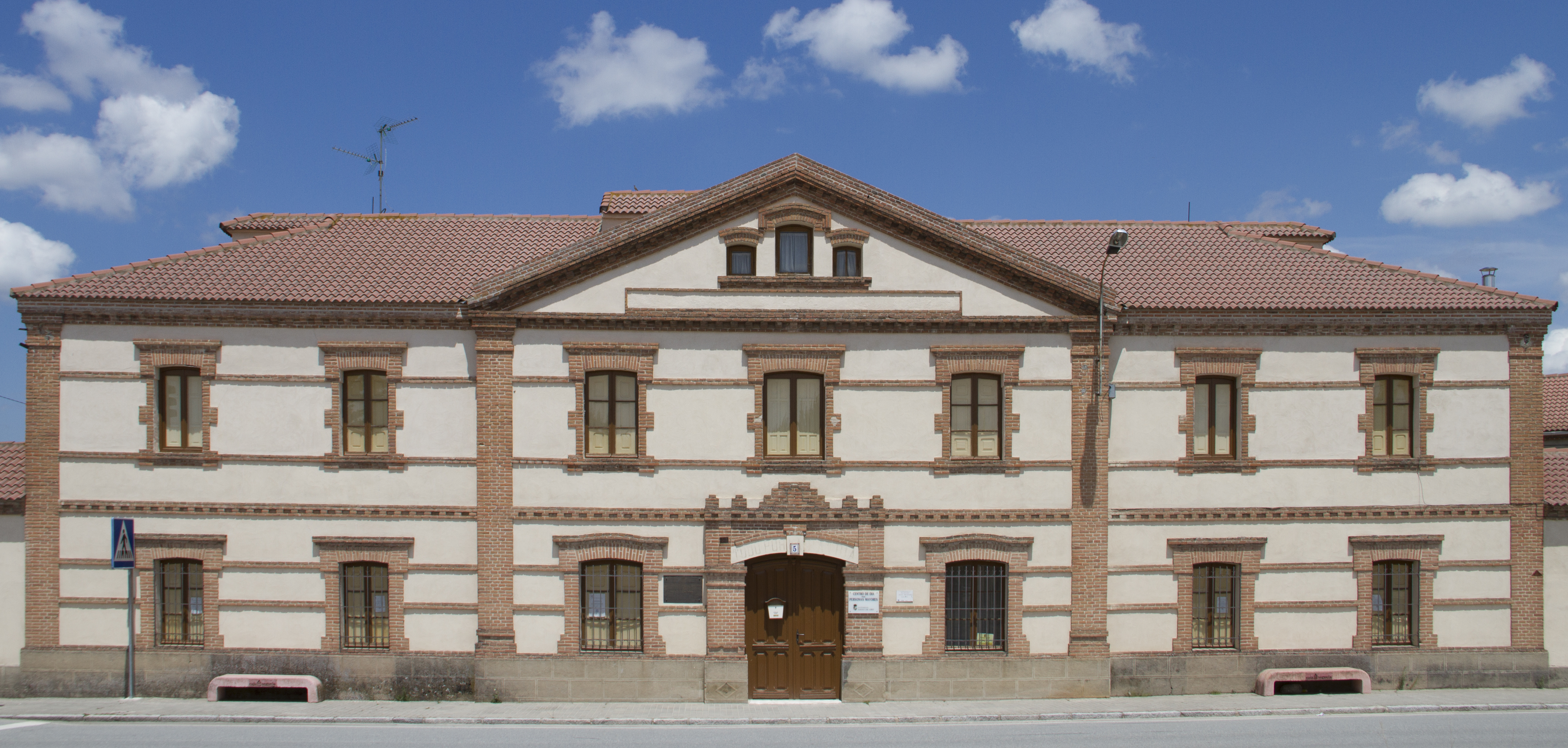 Centro de Día, antigua Ayuntamiento de Navas de Oro